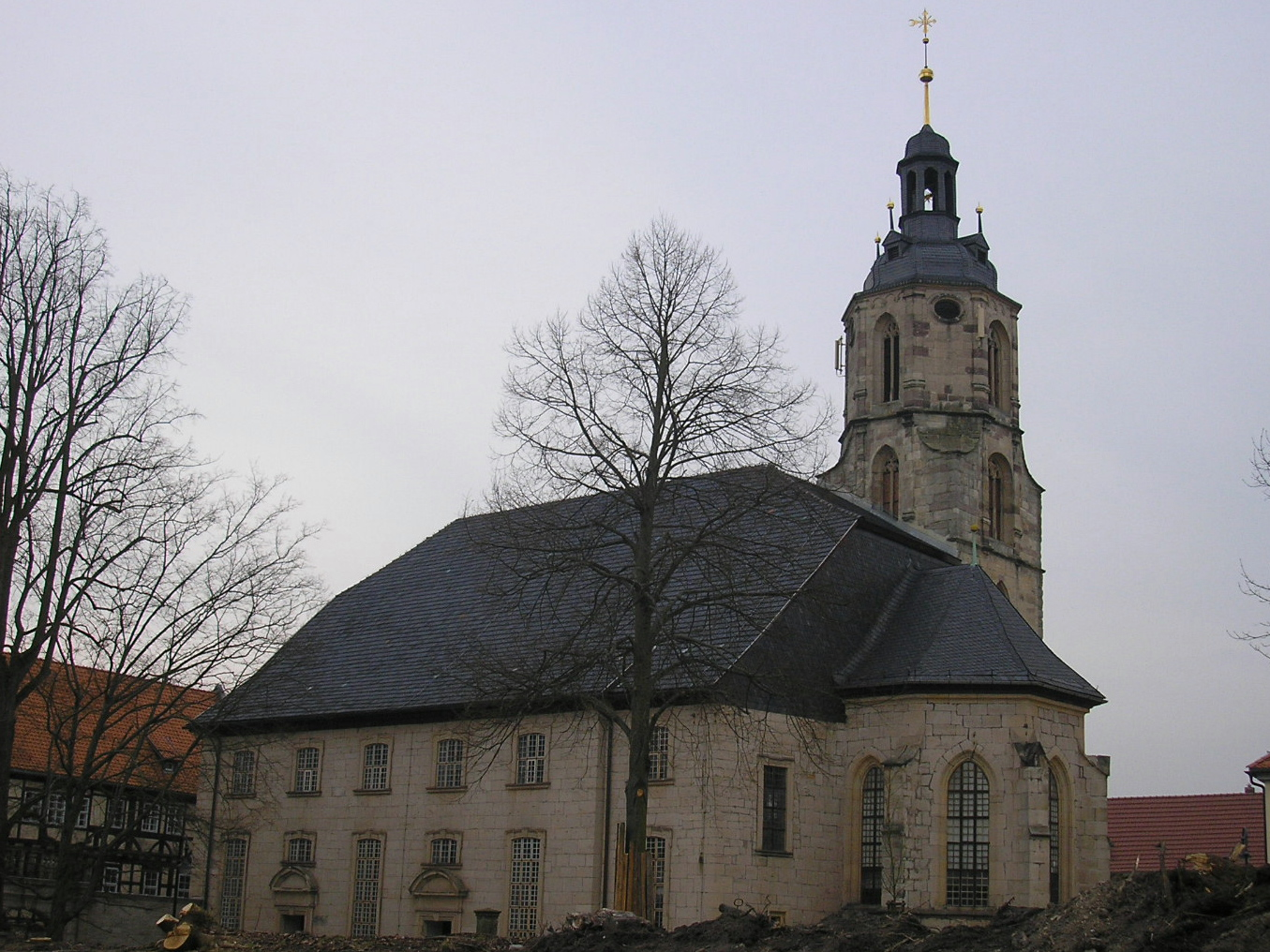 Die Stadtkirche St. Johannis in Schleusingen (Thüringen).